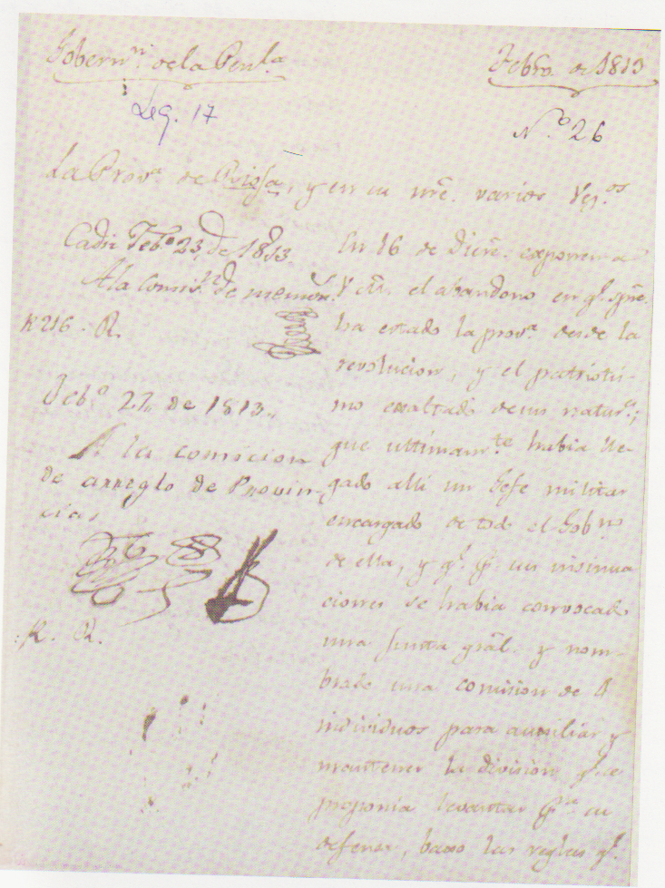 Es una de las actas manuscritas originales dando constancia de lo acordado en La Convención de Santa Coloma en el año 1812. El texto comienza diciendo. "La provincia de La Rioja y en su nombre varios vecinos...."